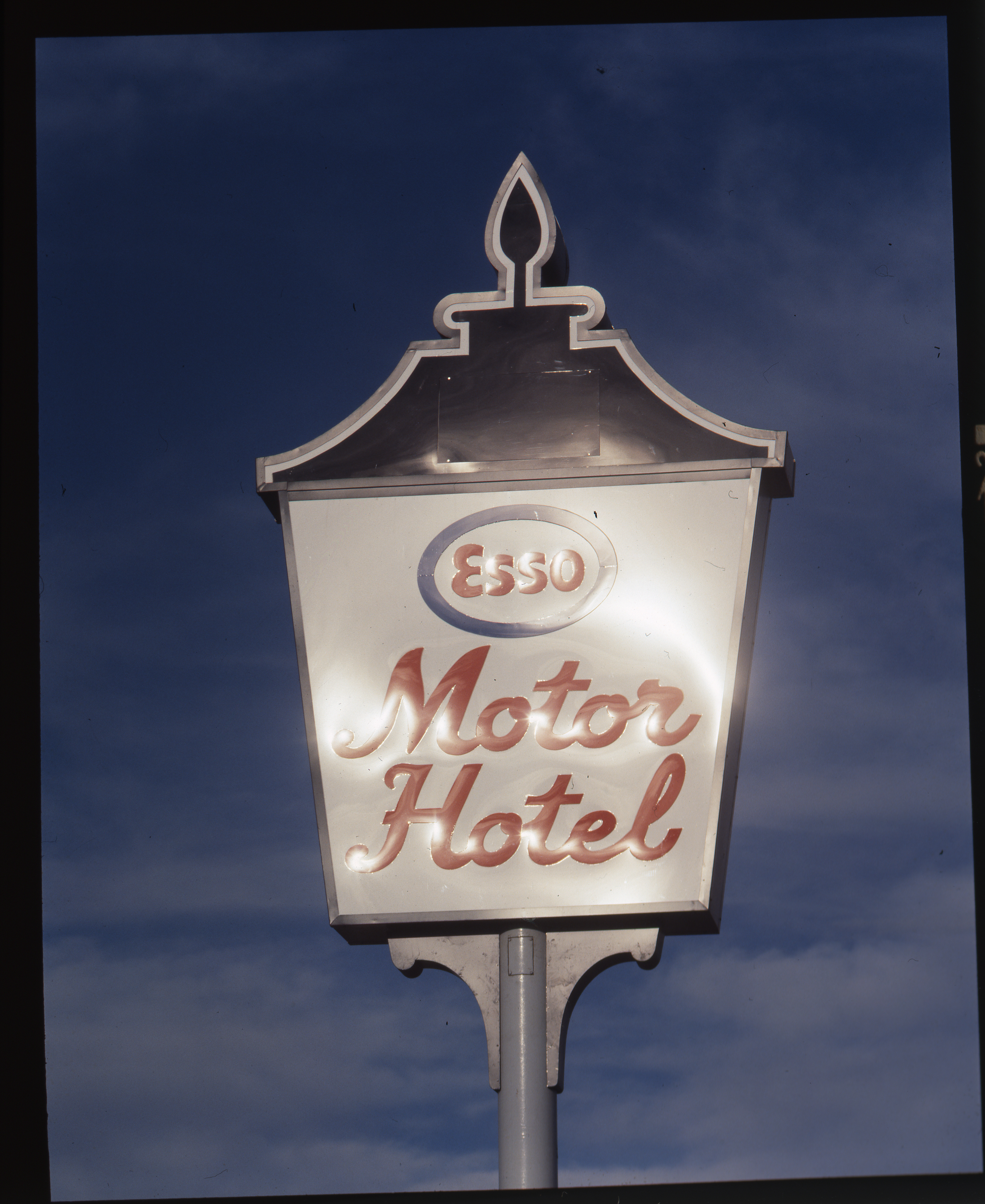 Bildet er hentet fra Arkivverket. Esso motorhotell Stavanger Arkivinstitusjon : Statsarkivet i Stavanger Arkivnavn : Pa 0982 - Esso Norge A/S Sted : Norge, Rogaland, Stavanger, Emneord: Bensinstasjon, Hotell, Olje, Petroleum Avbildet